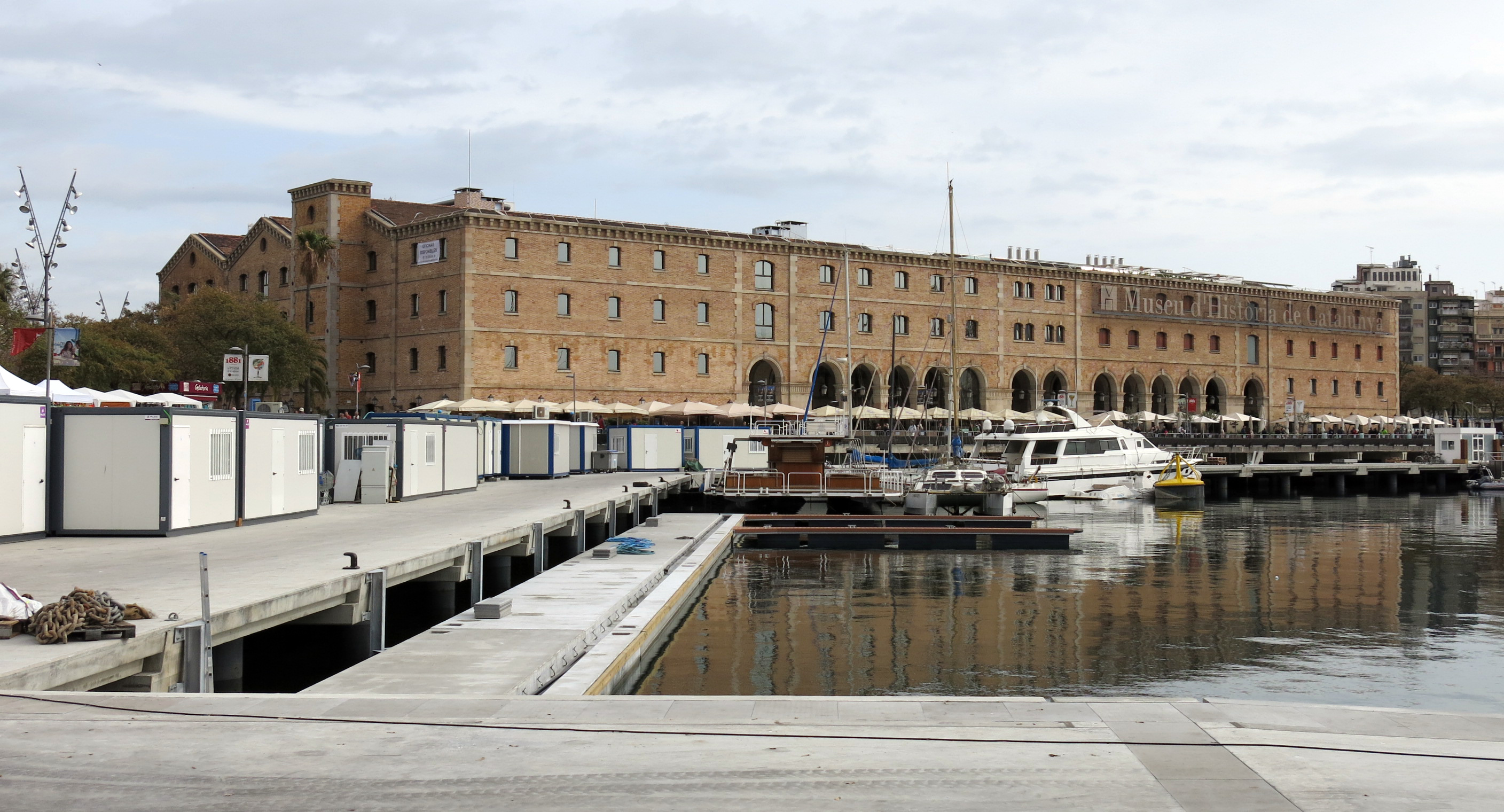 Magatzems generals del Dipòsit (Barcelona). Inclouen el Museu d'Història de Catalunya